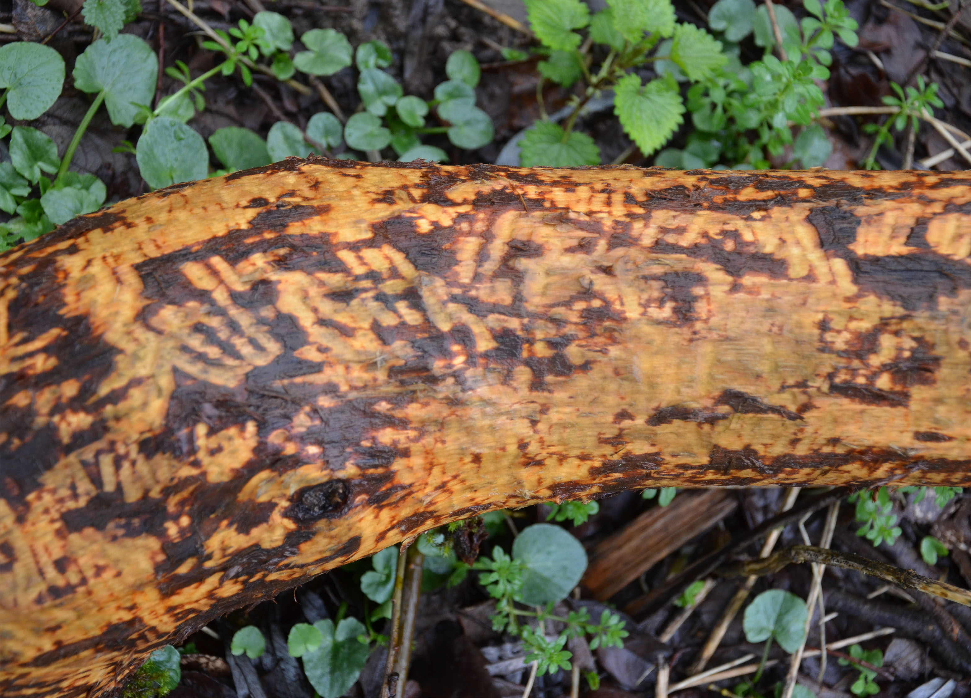 Bois rongé par le Castor fiber (Ardennes françaises)